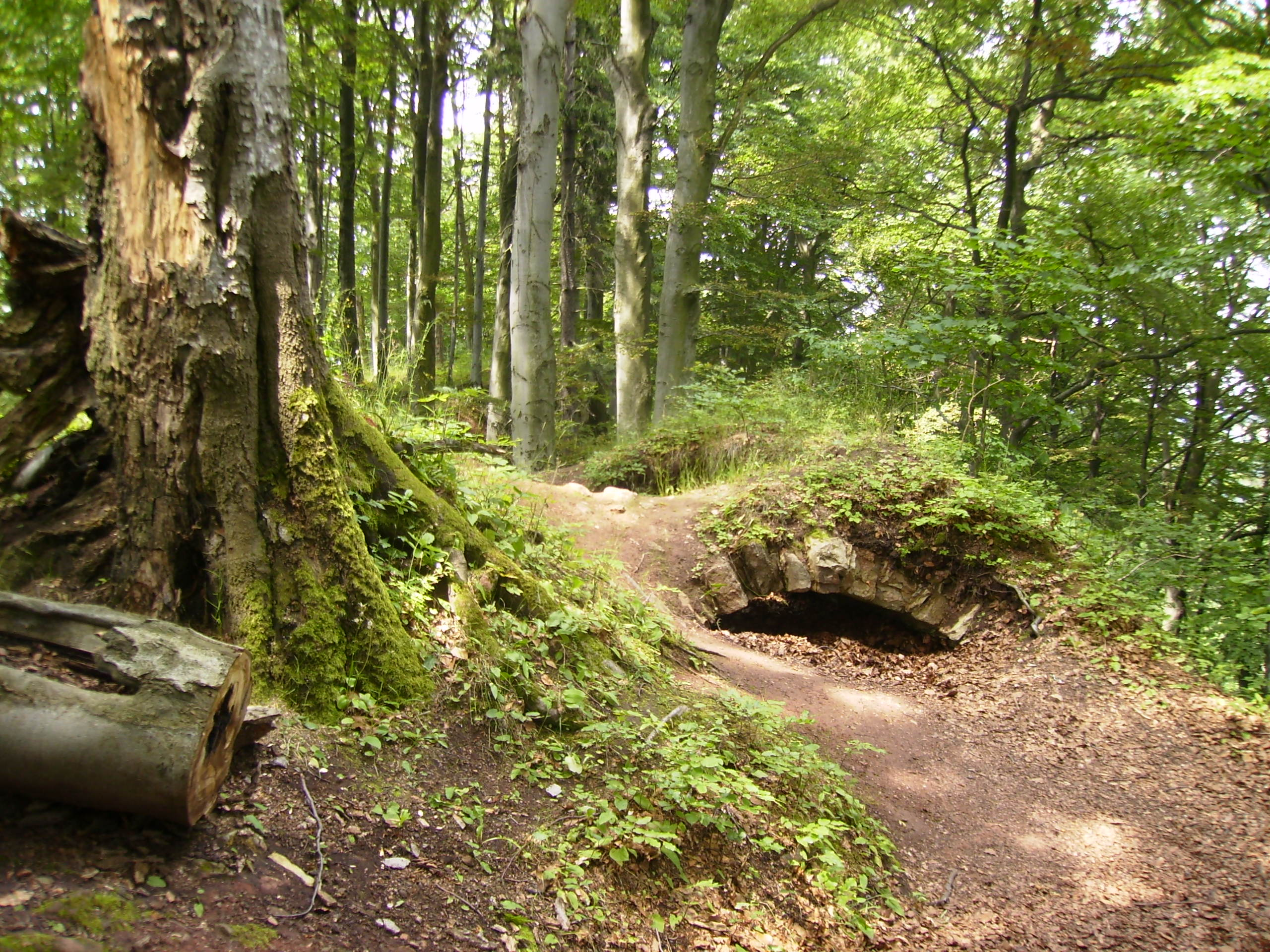 Hrad - Žampach a Chudoba, zřícenina (Žampach), Žampach